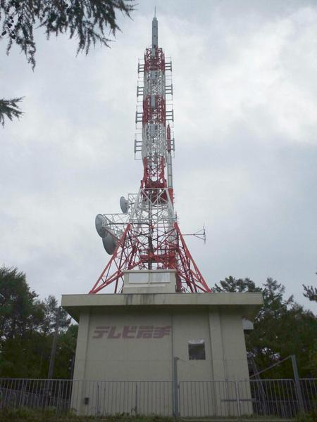 TVI新山送信所